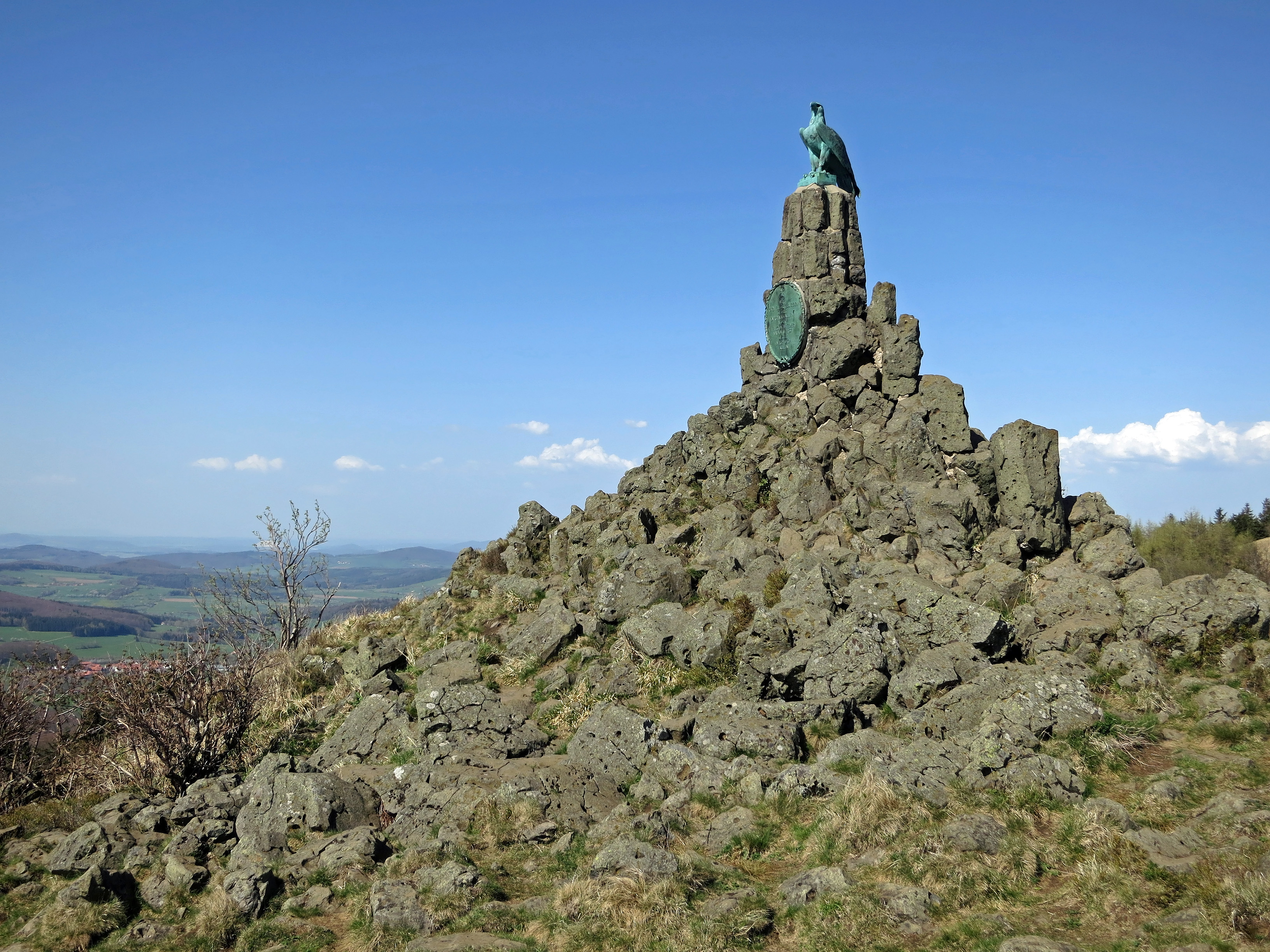 Das Fliegerdenkmal wurde 1923 errichtet und befindet sich am Westhang der Wasserkuppe, oberhalb von Abtsroda. Es erinnert an die gefallenen Feldpiloten des Ersten Weltkriegs (1914–1918). Das Fliegerdenkmal wurde auf einem ehemaligen Vulkanschlot errichtet. Carl Oskar Ursinus hat diesen Ort für eine jährliche Gedenkfeier bestimmt. Die Skulptur wurde vom Bildhauer und Tierplastiker August Gaul geschaffen. Gegossen wurde sie in der Kunstgießerei Noack in Berlin. Die Inschrift lautet: WIR TOTEN FLIEGER BLIEBEN SIEGER DVRCH VNS ALLEIN VOLK FLIEG DV WIEDER VND DV WIRST SIEGER DVRCH DICH ALLEIN